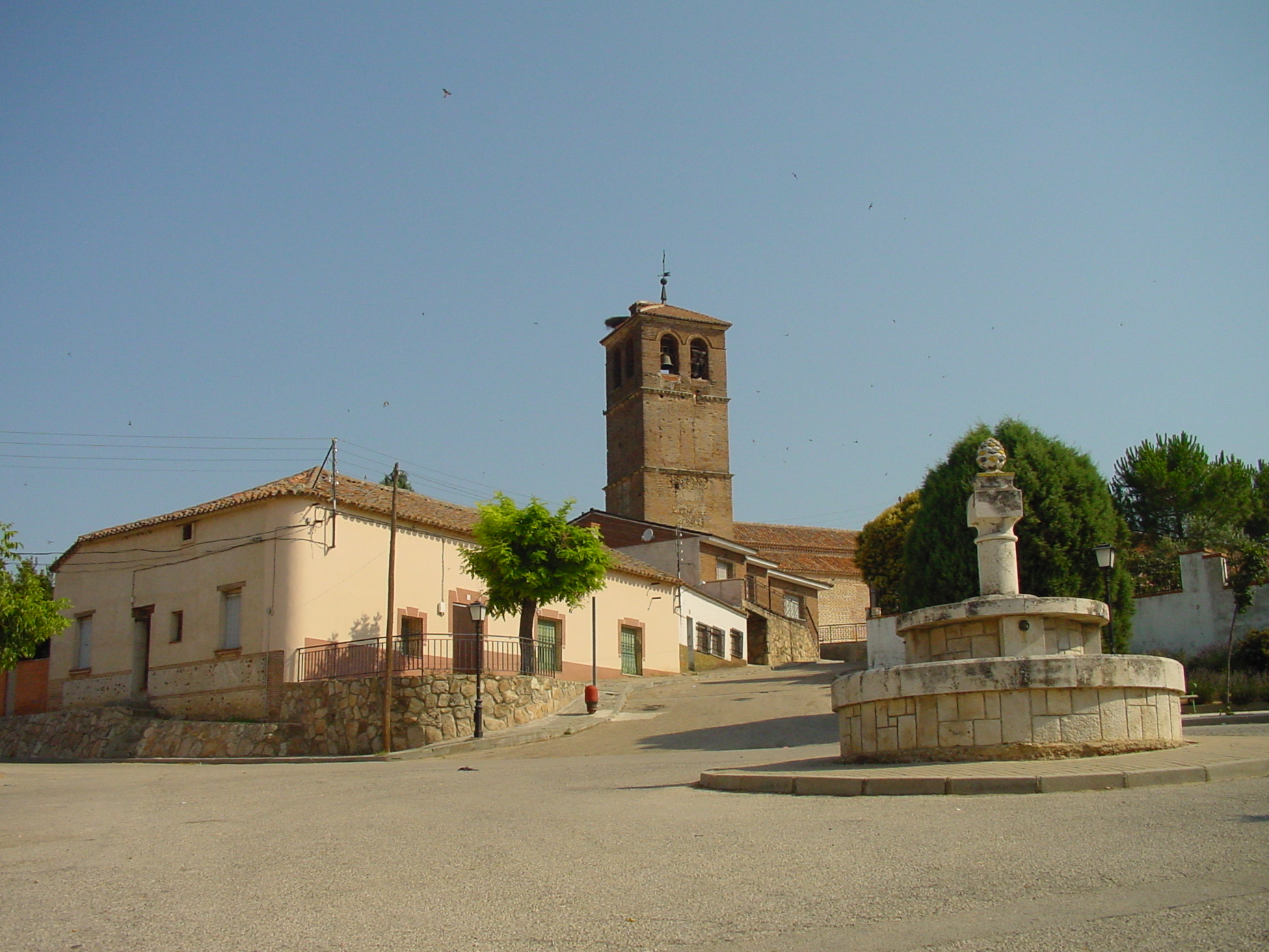 Plaza con fuente e iglesia al fondo en Ribatejada.